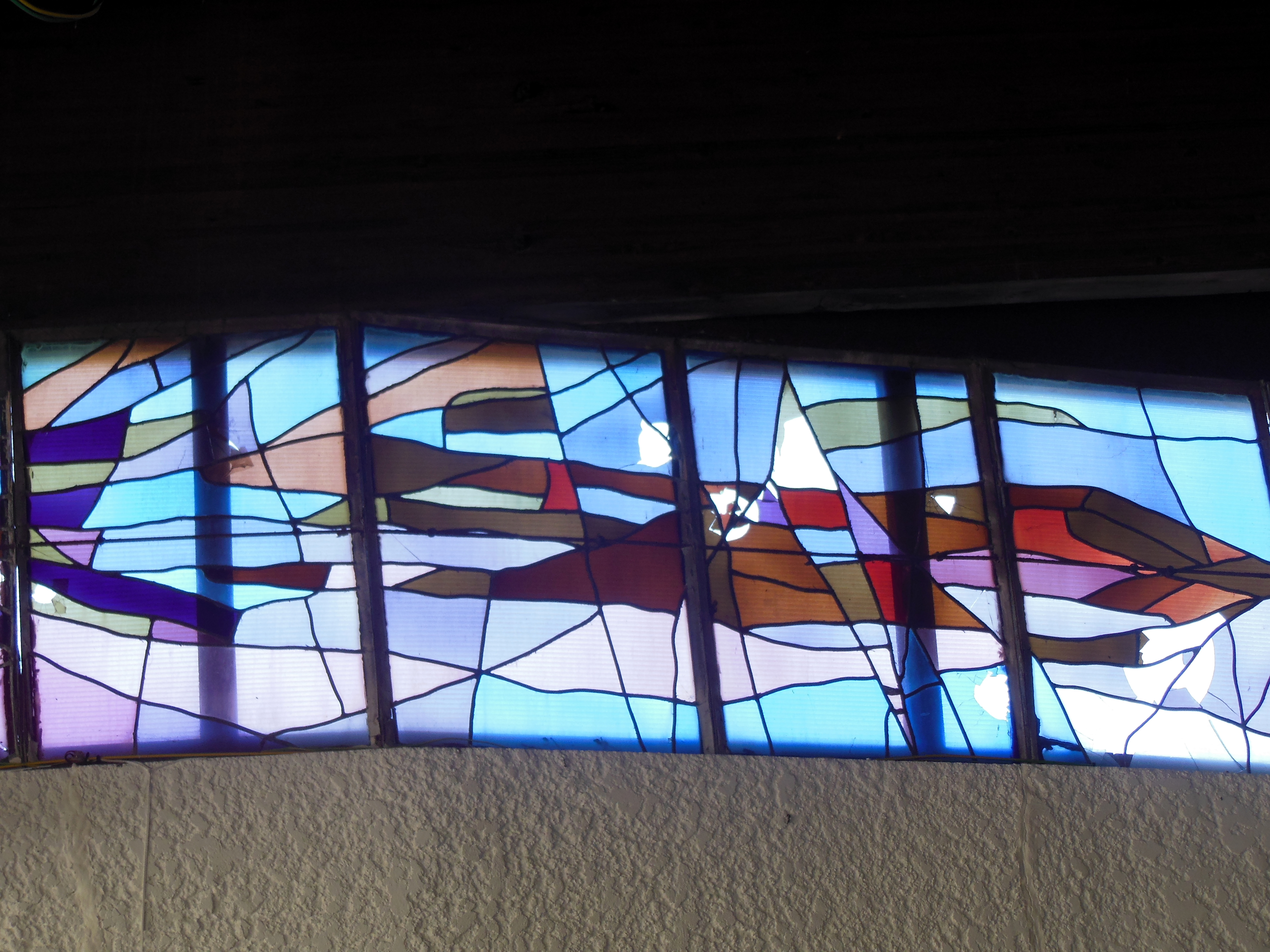 Chapelle Notre-Dame des Dunes de Mimizan-Plage (Landes, France). Frise de vitraux